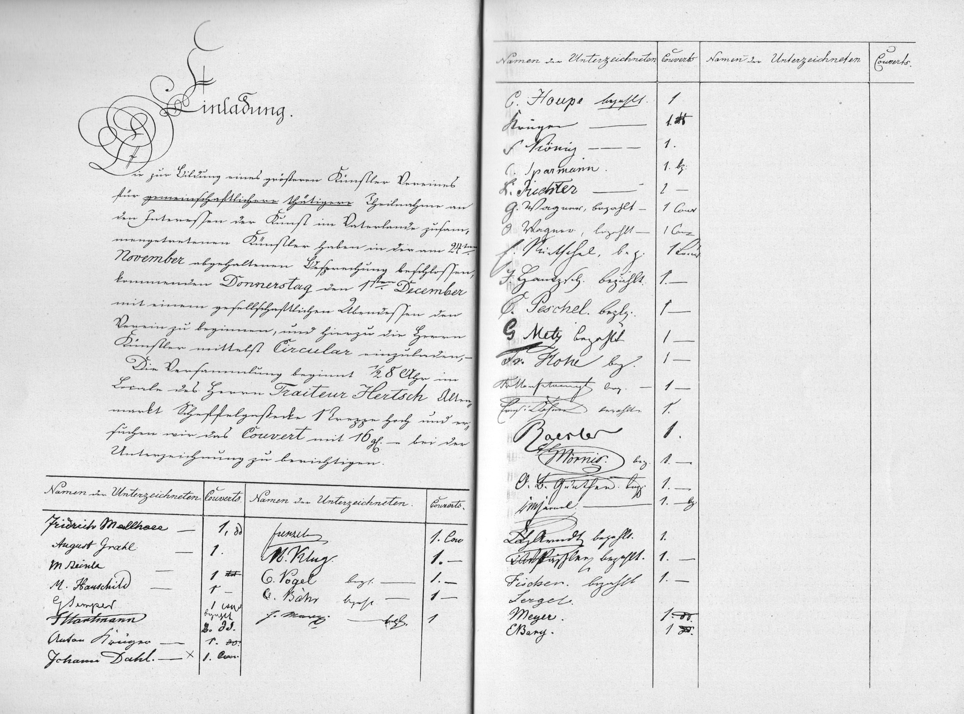 Gründungseinladung und gleichzeitg Liste der Gründungsmitglieder von 1836 (ev. unvollständiger Abdruck/Reprint im Jubiläumskatalog 100 Jahre Dresdner Kunstgenossenschaft von 1938).